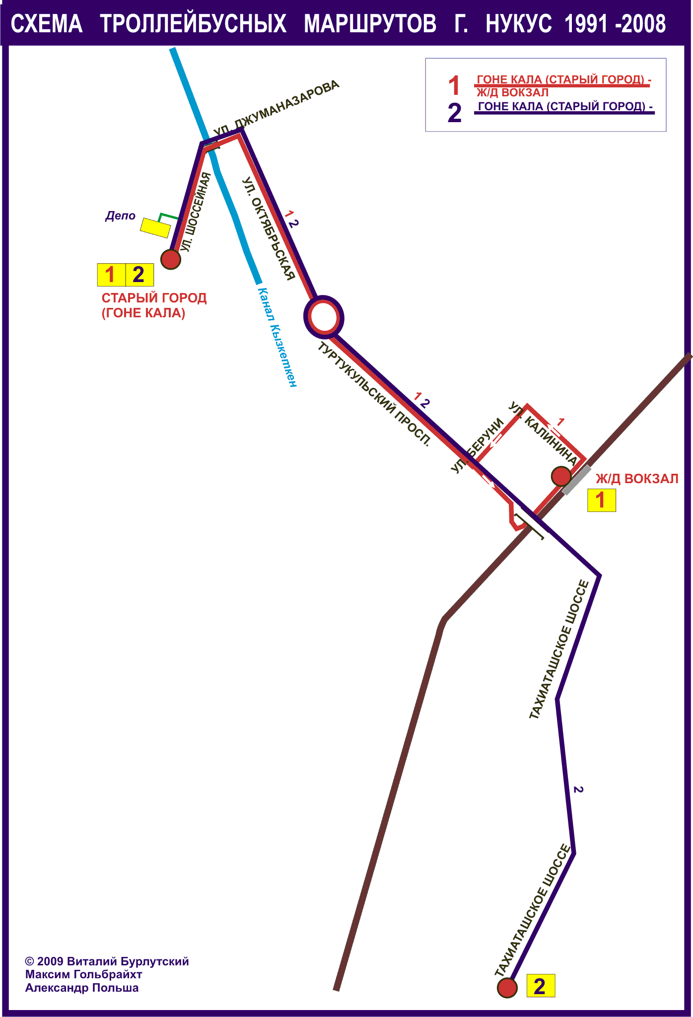 Карта